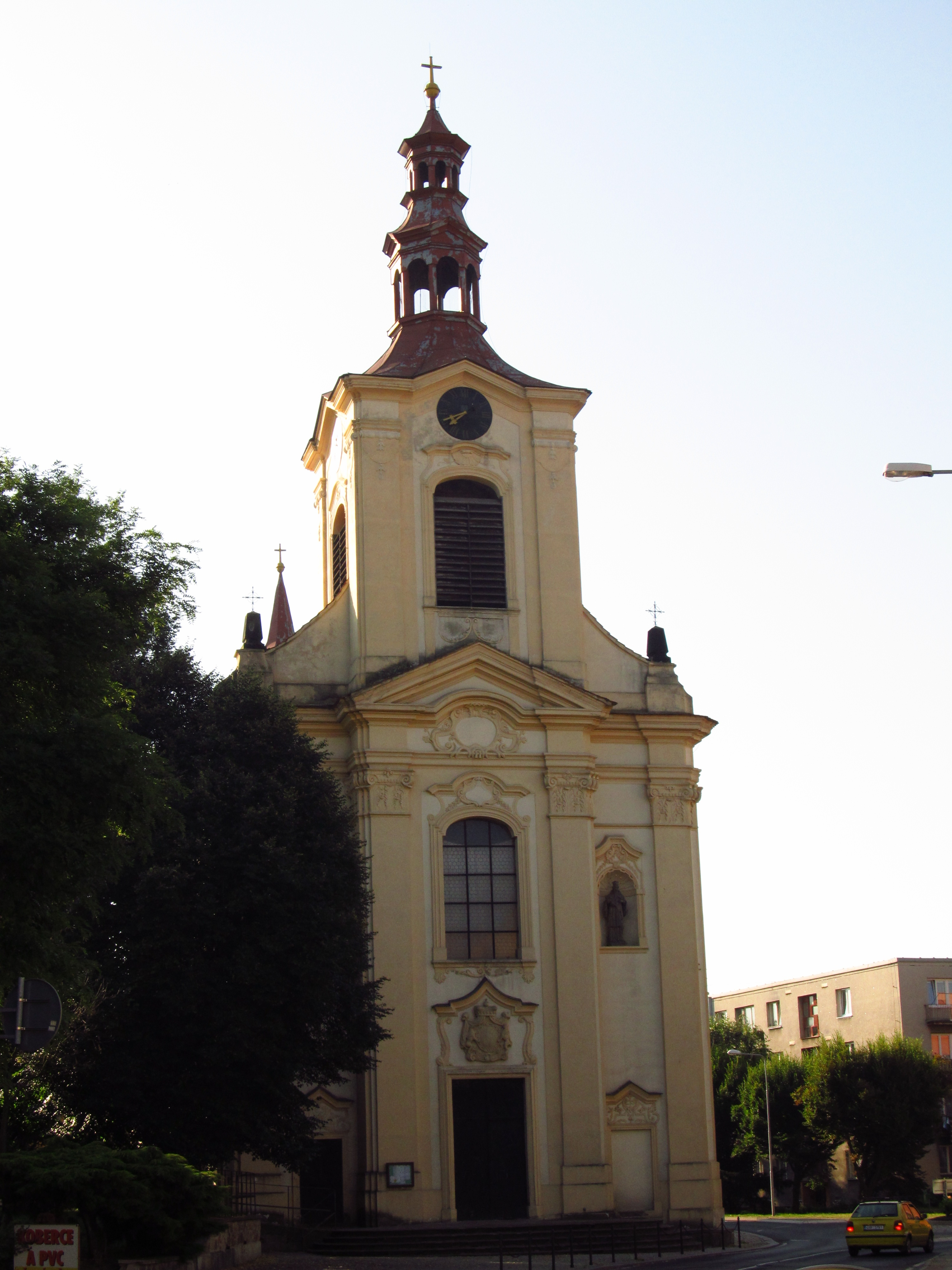 Kostel sv. Václava (Lovosice), Lovosice